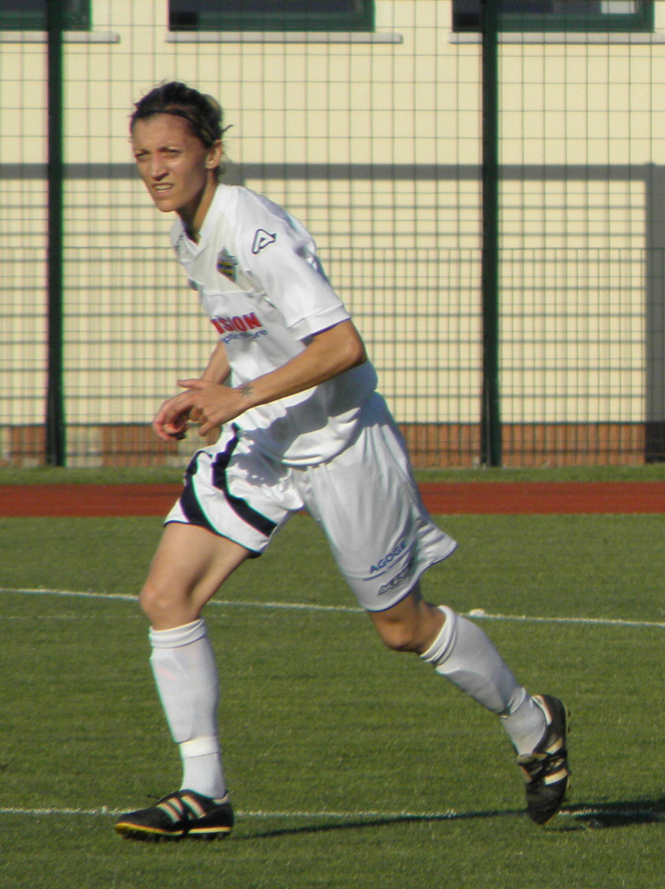 Abano Terme, Stadio delle Terme: 16 giugno 2018, spareggio UEFA Women's Champions League. Alessia Tuttino durante una fase di gioco.